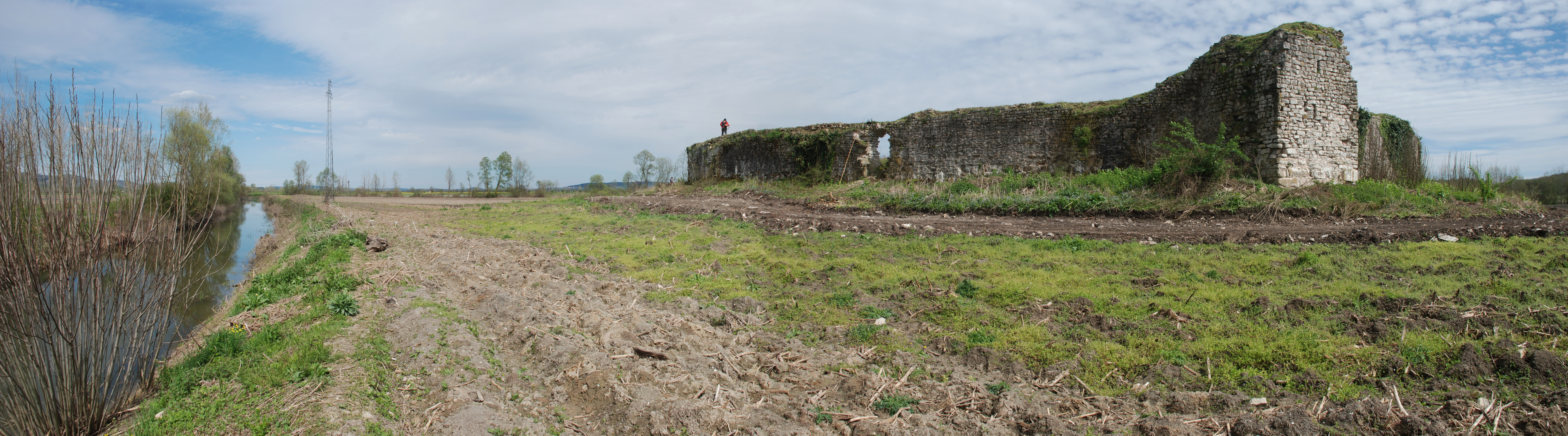 Sakarya ili, Söğütlü ilçesinde yer alan Bizans İmparatorluğuna ait antik kale kalıntısı.